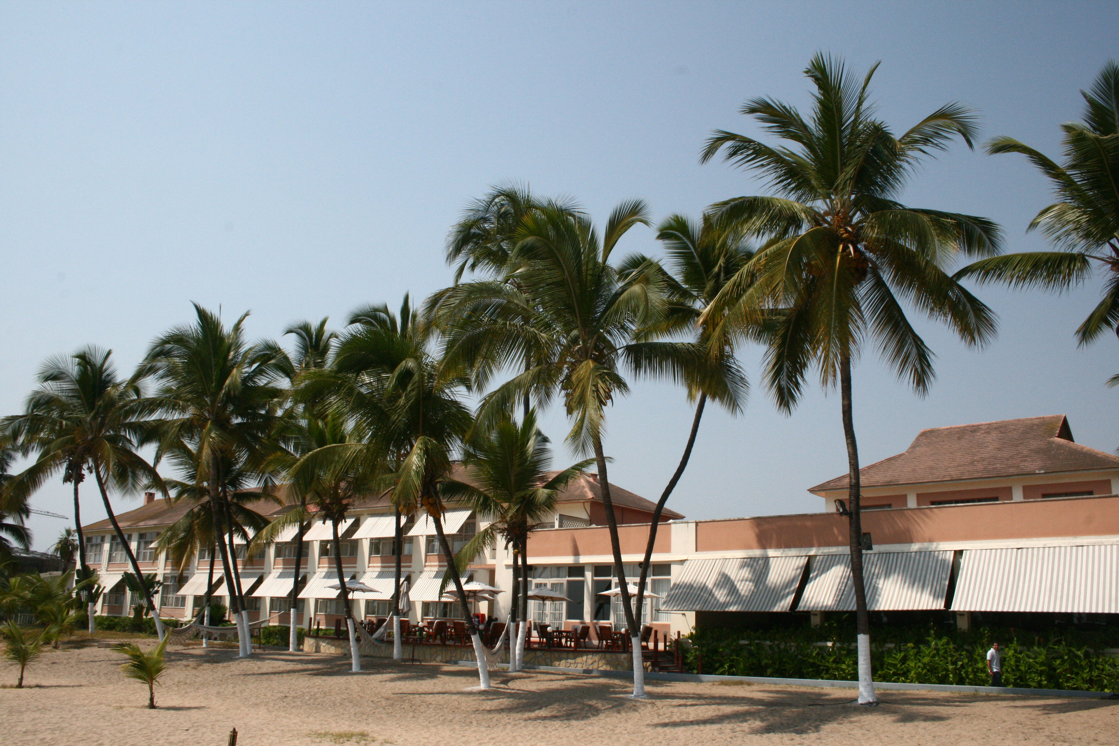 Hotel in Lobito, Angola